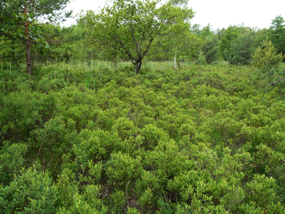 Ficocenozy zespołu Myricetum galis - Natura 2000 Mierkowskie Wydmy